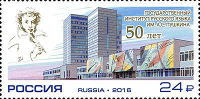 Почтовая марка России, выпущенная 6 июня 2016 года, посвящённая 50-летию Государственного института русского языка им. А.С. Пушкина. Портрет А. С. Пушкина, здание института. Номер по каталогу ЦФА — 2096. Художник — И. Ульяновский. Тираж — 240000.